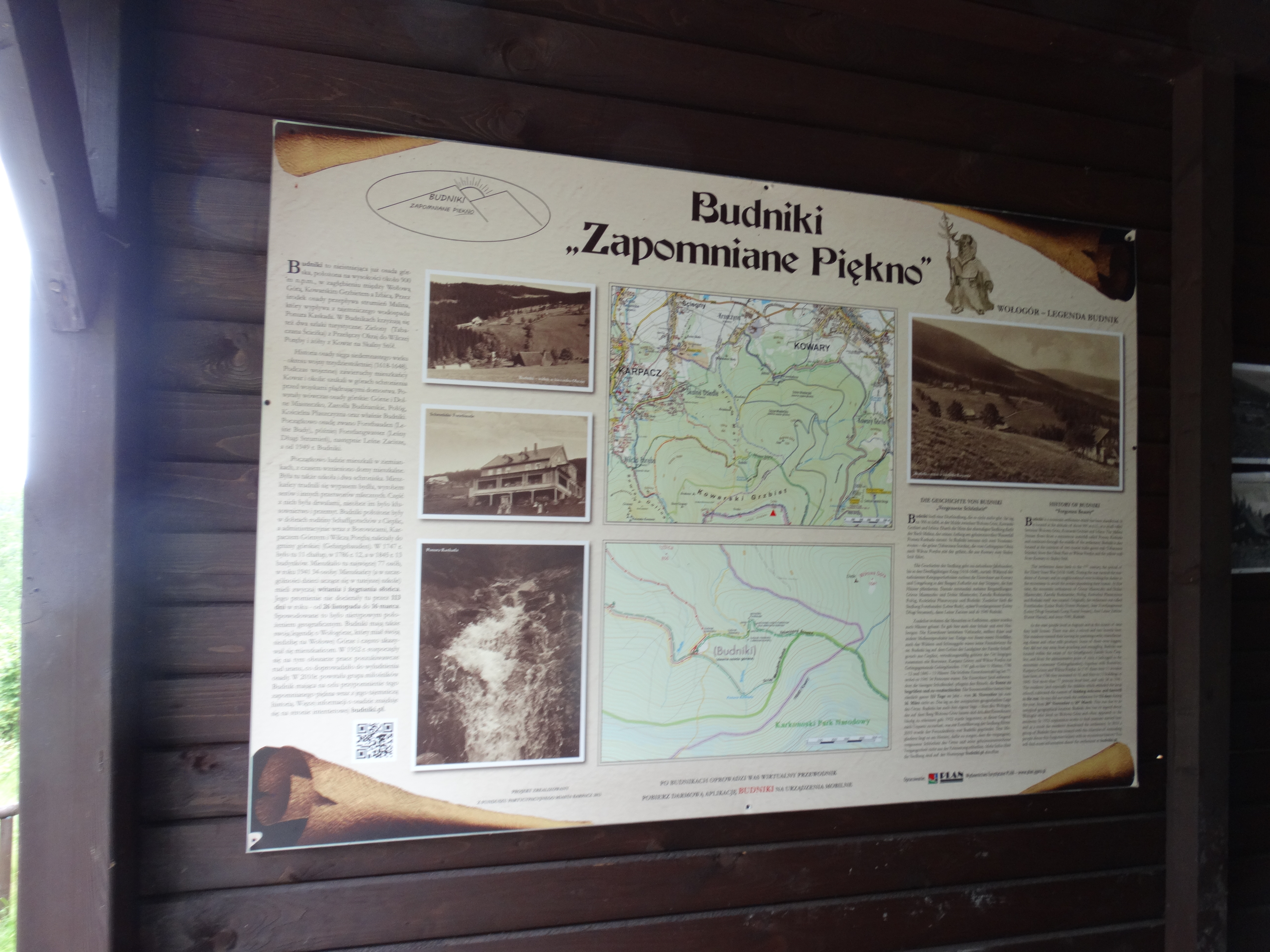 Tablica informacyjna